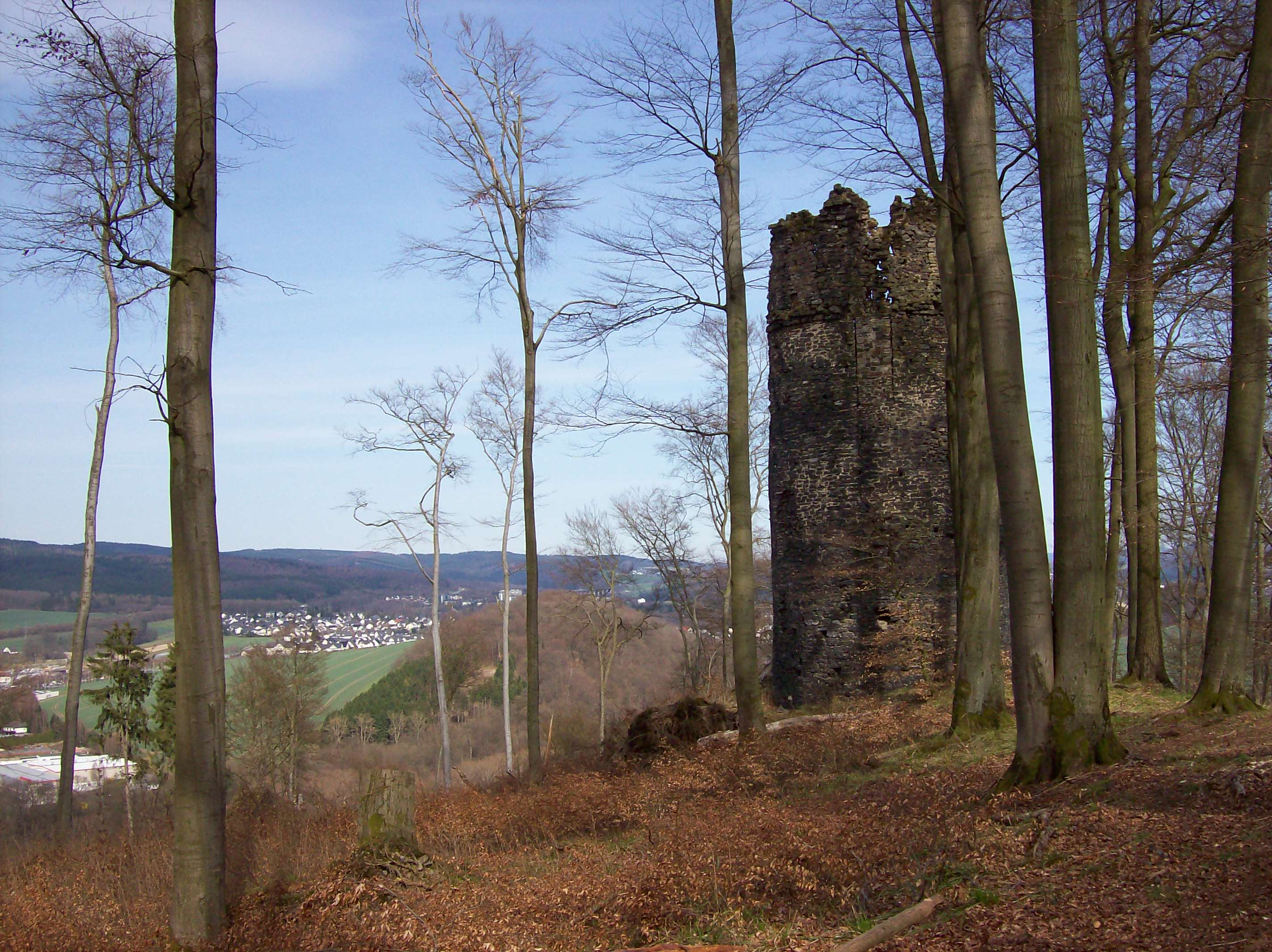 Turmruine Laer, Meschede (Germany)